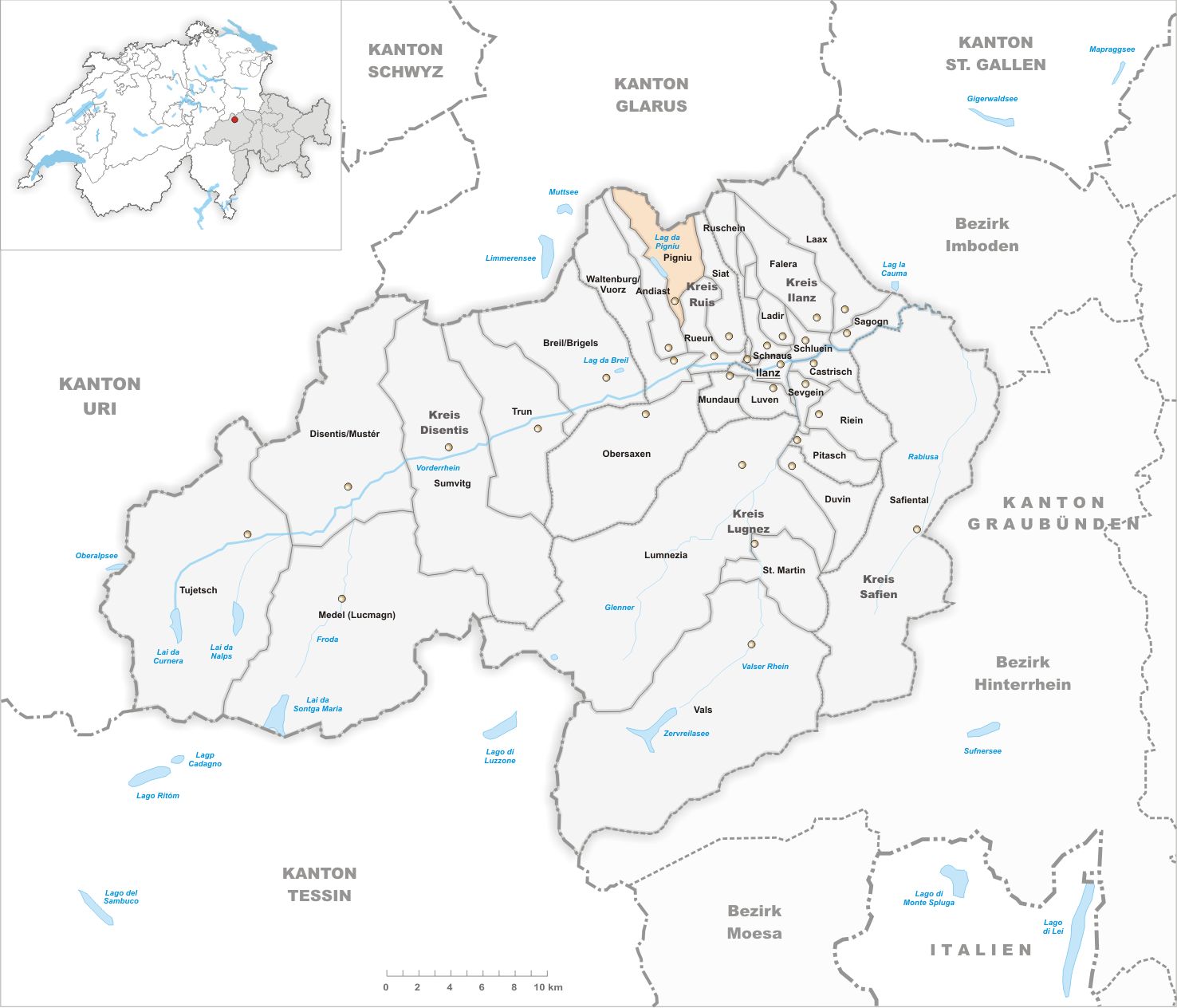 Municipality Pigniu